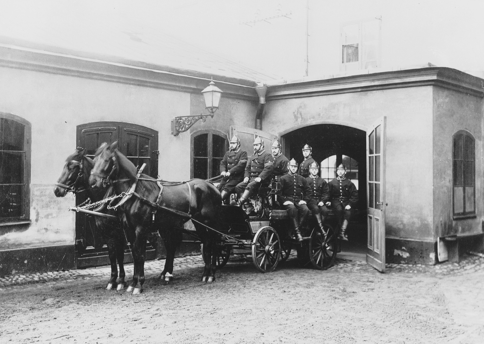 Östermalms brandstation i kvarteret Vildsvinet (dagens Östermalm 1:17)